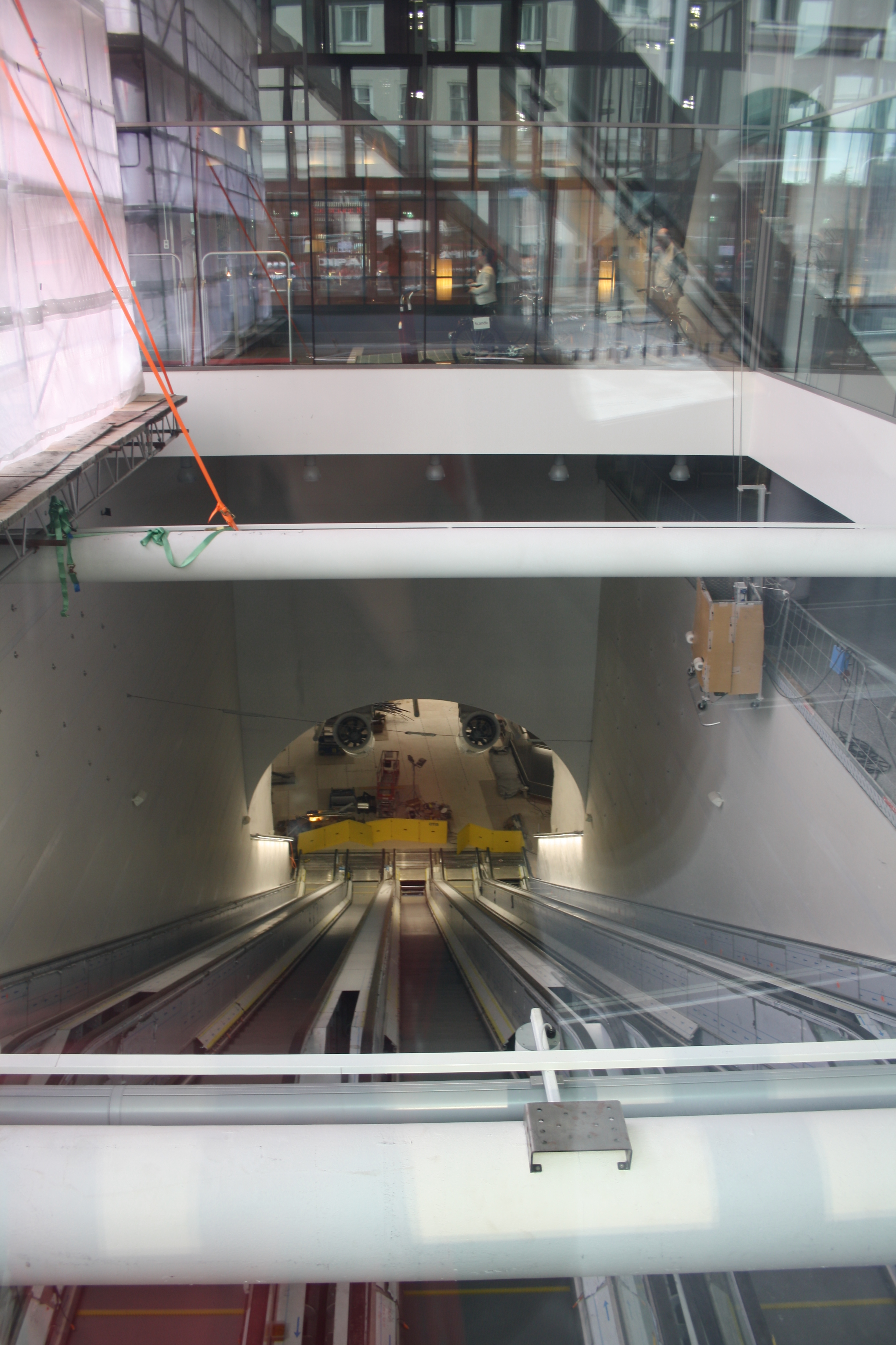 Rulltrappor till Stockholm City vid Hotell Continental Stockholm